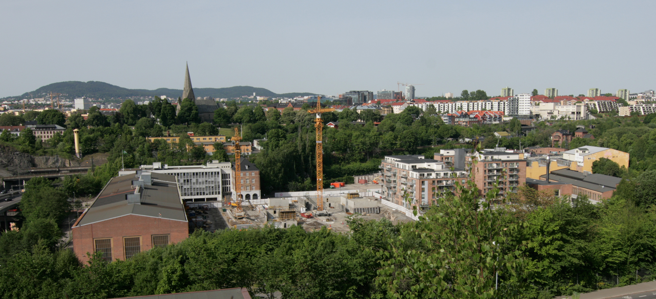 Kværnerbyen under bygging, sommeren 2008.